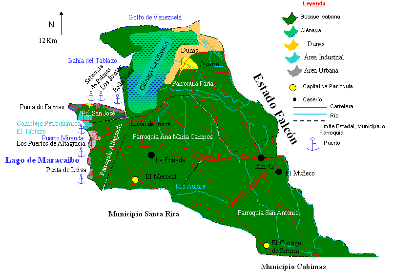 Mapa del Municipio Miranda, Estado Zulia, Venezuela